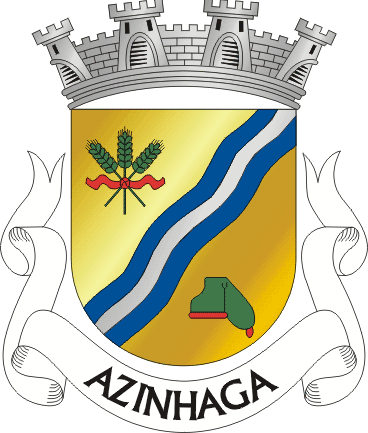 Armas da Azinhaga